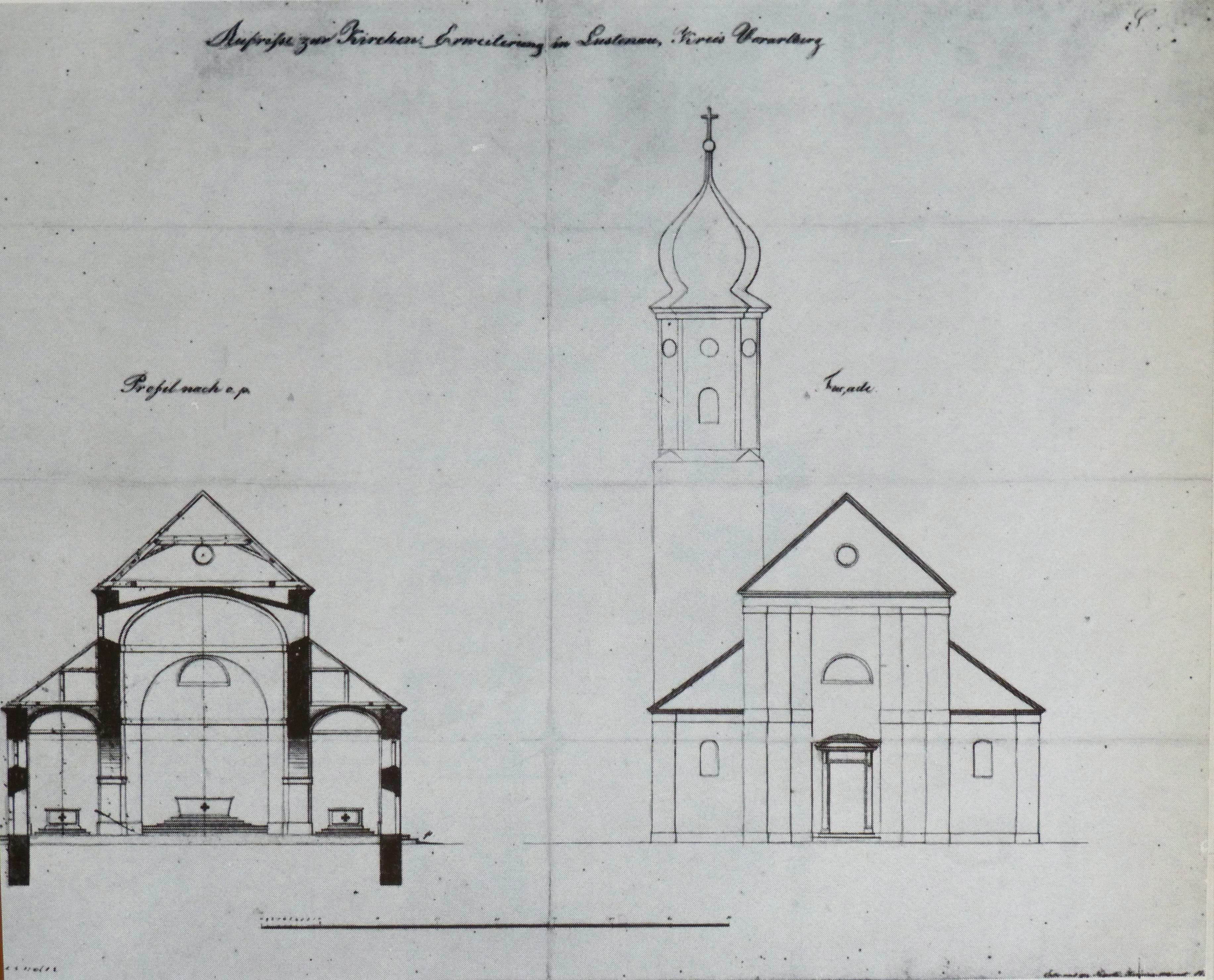 Aufriss und Fassade der 1830 gebauten Pfarrkirche St. Peter und Paul in Lustenau